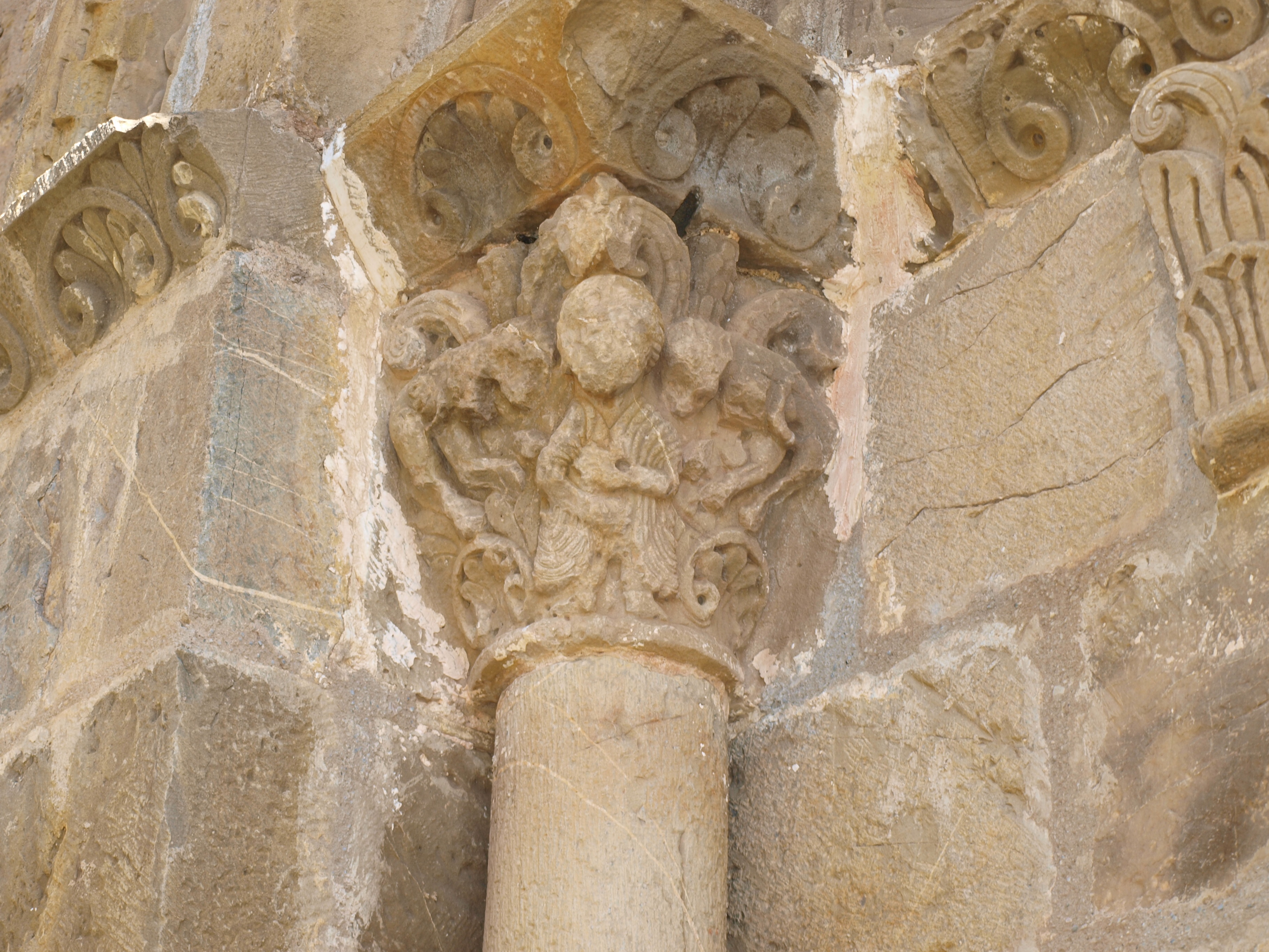 Detalle de un capitel original de la portada de la iglesia románica altoaragonesa de Santa María de Iguacel.